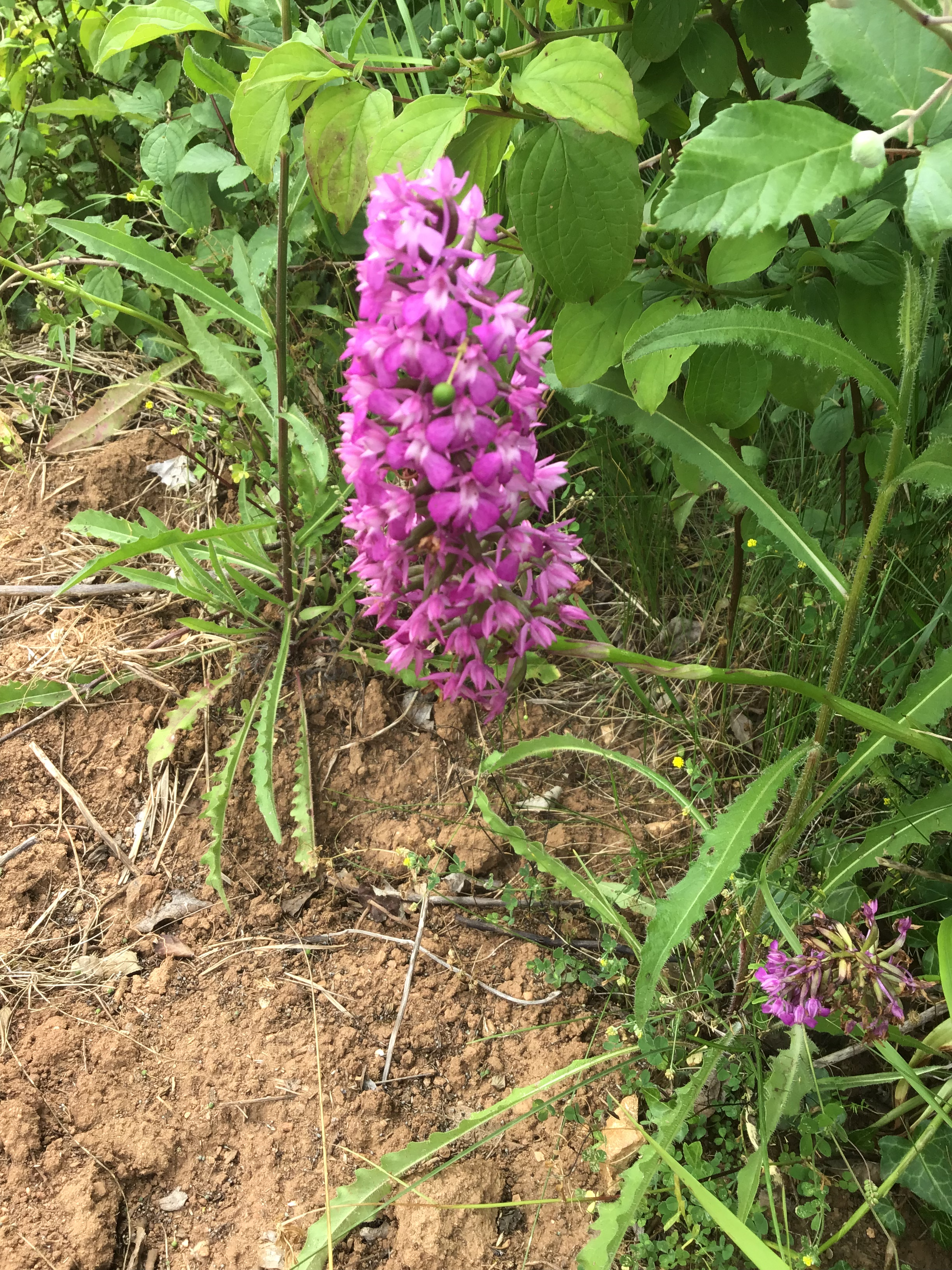 Orchis pyramidal très présente sur les Causses du Lot, ici aux confins de Mayrac et Baladou (Causse de Martel, Lot) en juin 2019.